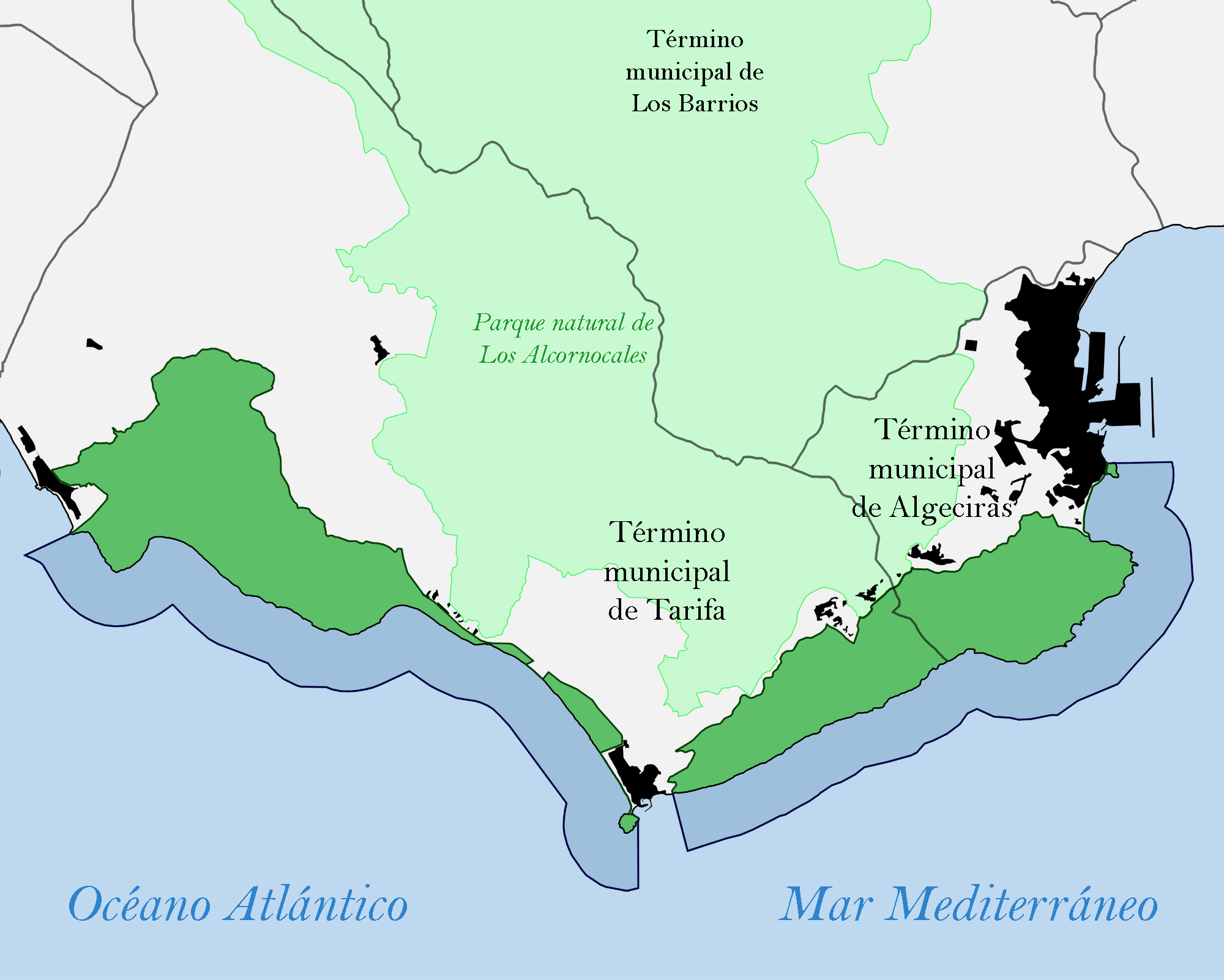 Mapa de situación del Parque natural del Estrecho.